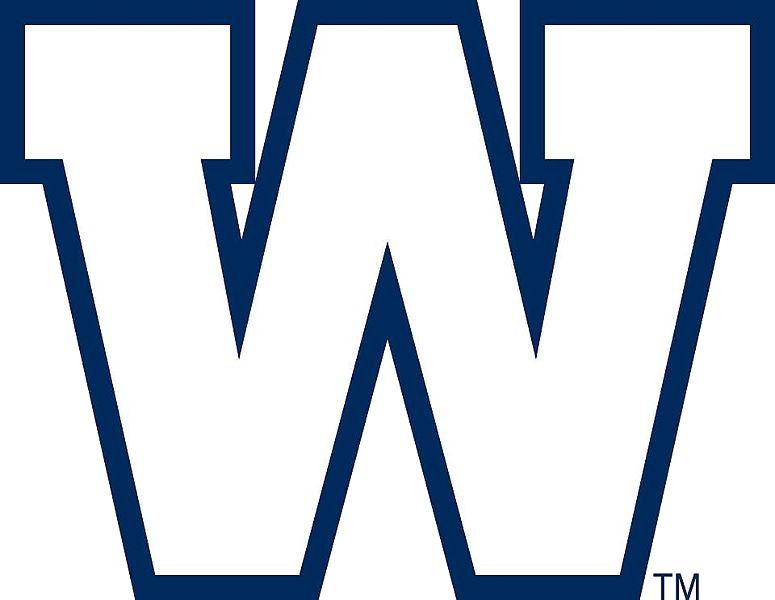 Logo des Canadian Football Klubs Winnipeg Blue Bombers